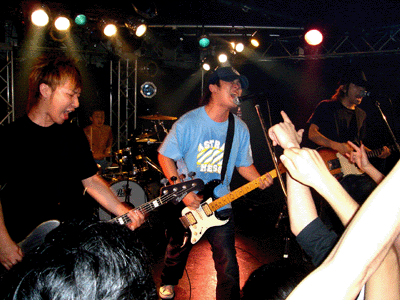 emptyslowの写真